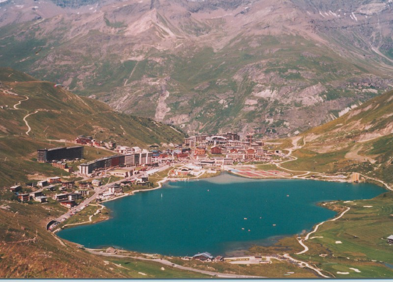 Station de Tignes-le-lac, l'été, vue d'altitude Date : Août 1997